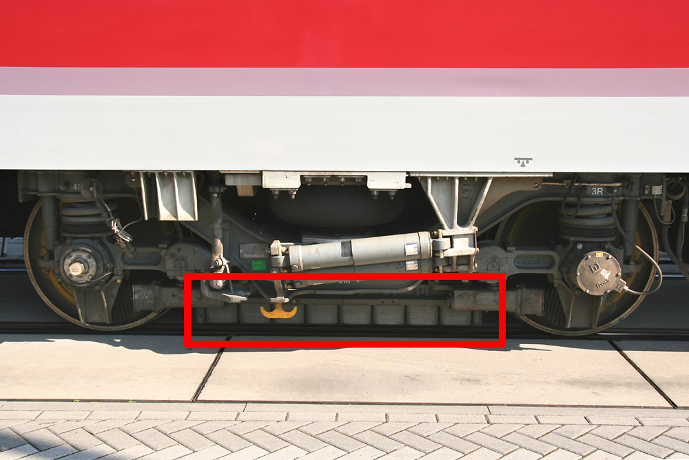 Magnetschienenbremse im Drehgestell des ICE S, wie es auch im ICE 3 zum Einsatz kommt.